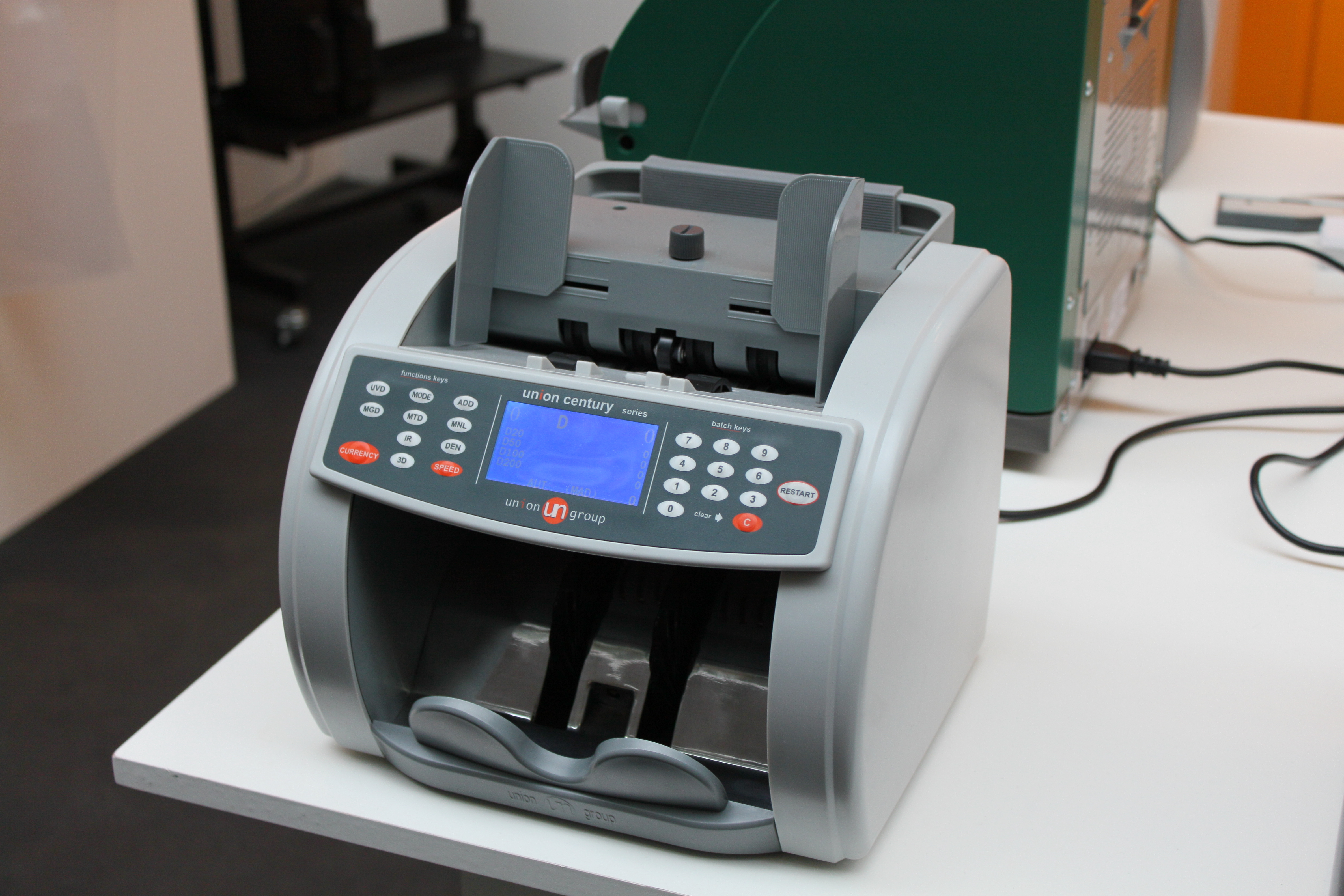 CeBIT 2011; Geldzählmaschine